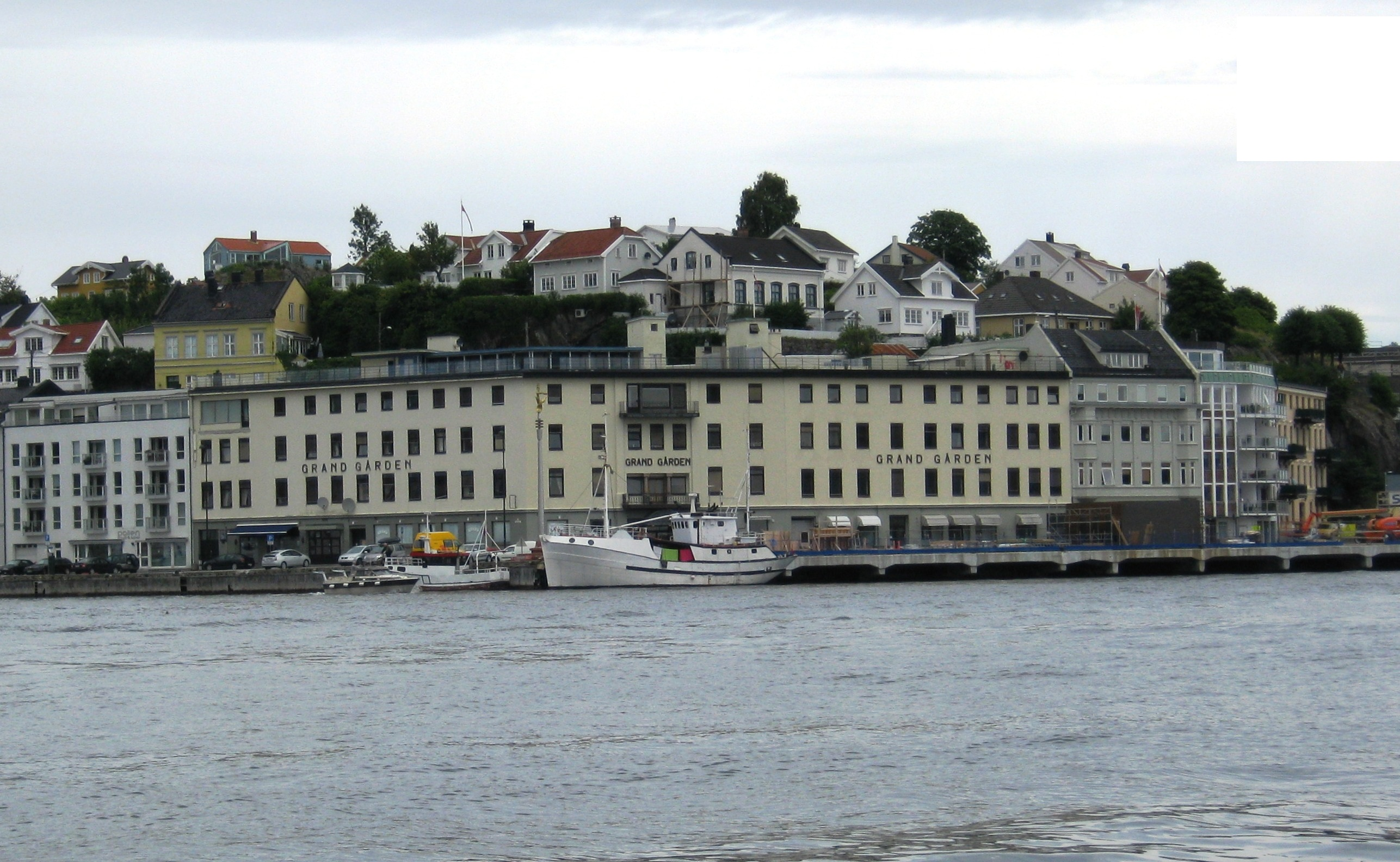 Grandgården på Langbryggen i Arendal, Norge